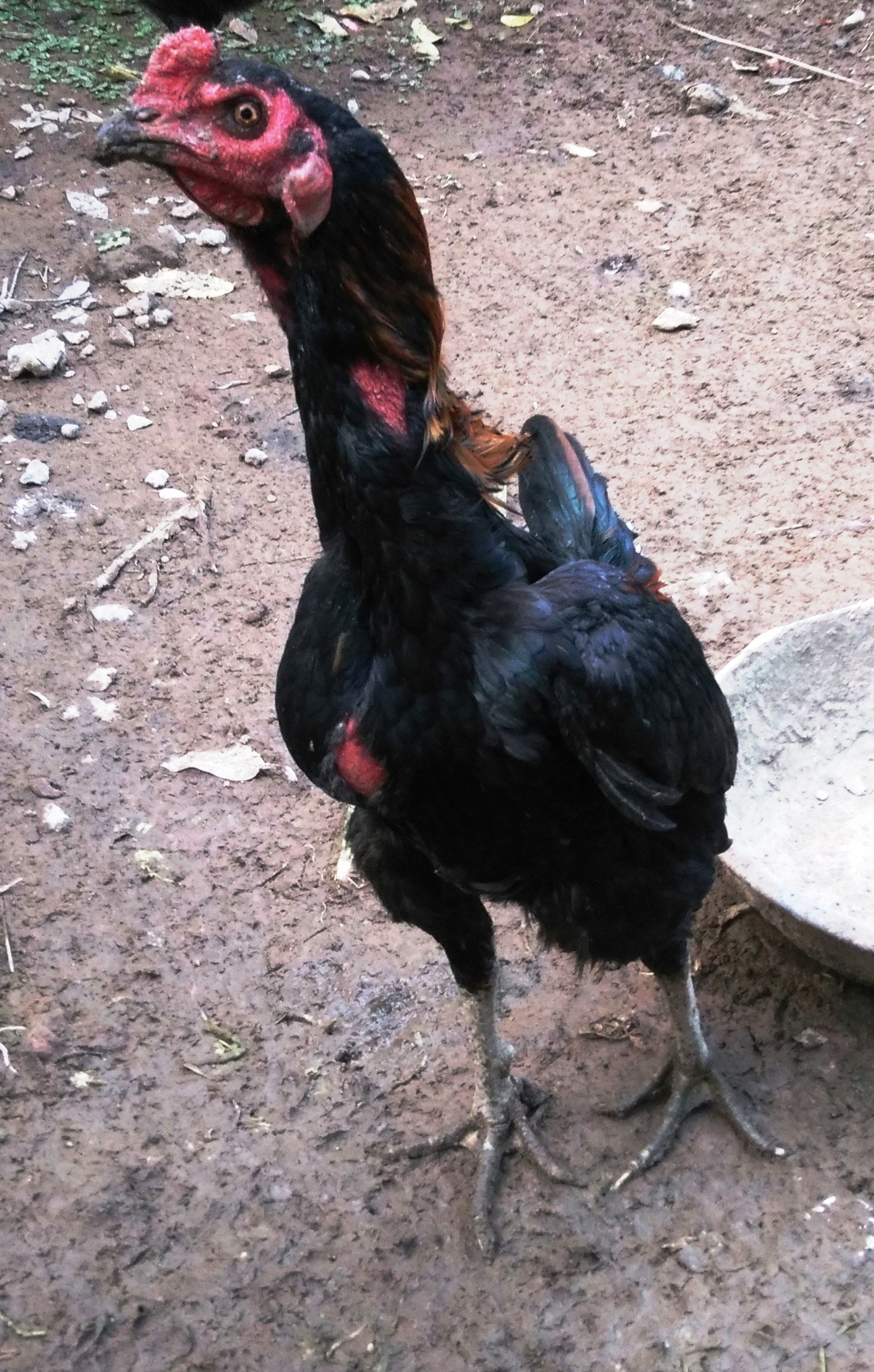 Gà chọi của cậu Cảm (đuôi cúp)